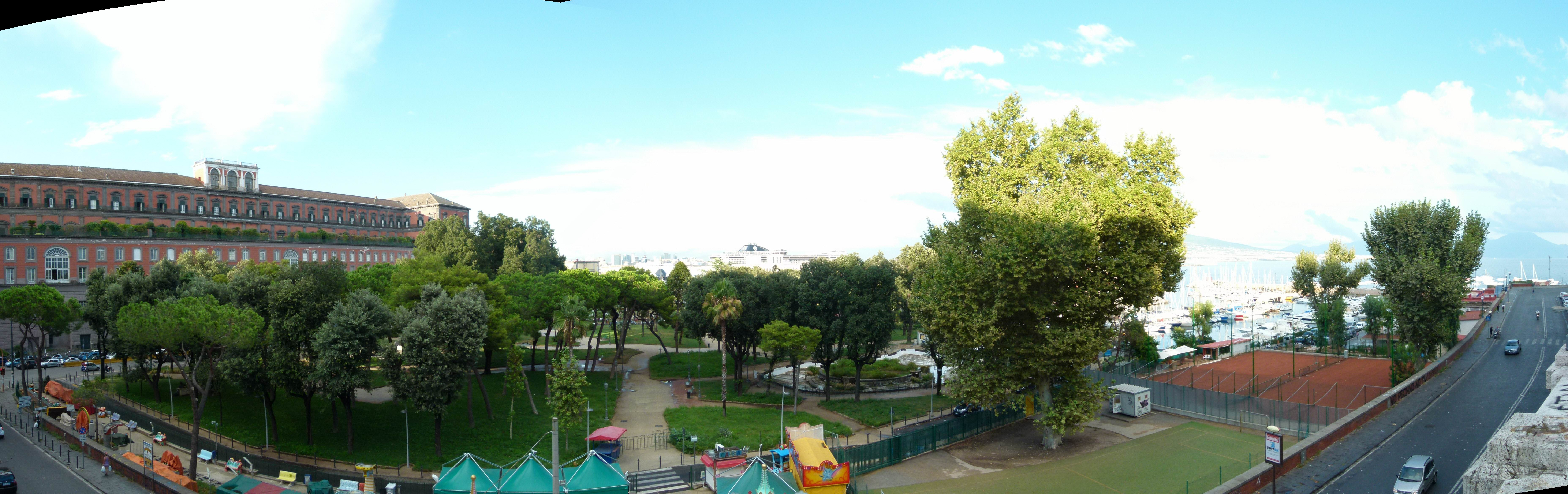 Armando Tripodi